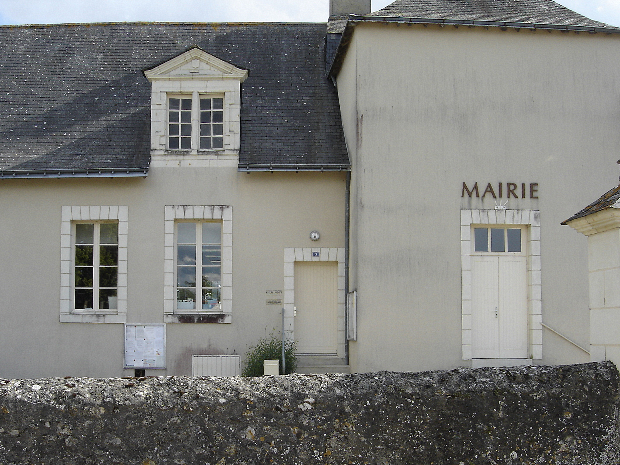 Mairie de Pontigné (Maine-et-Loire, France).